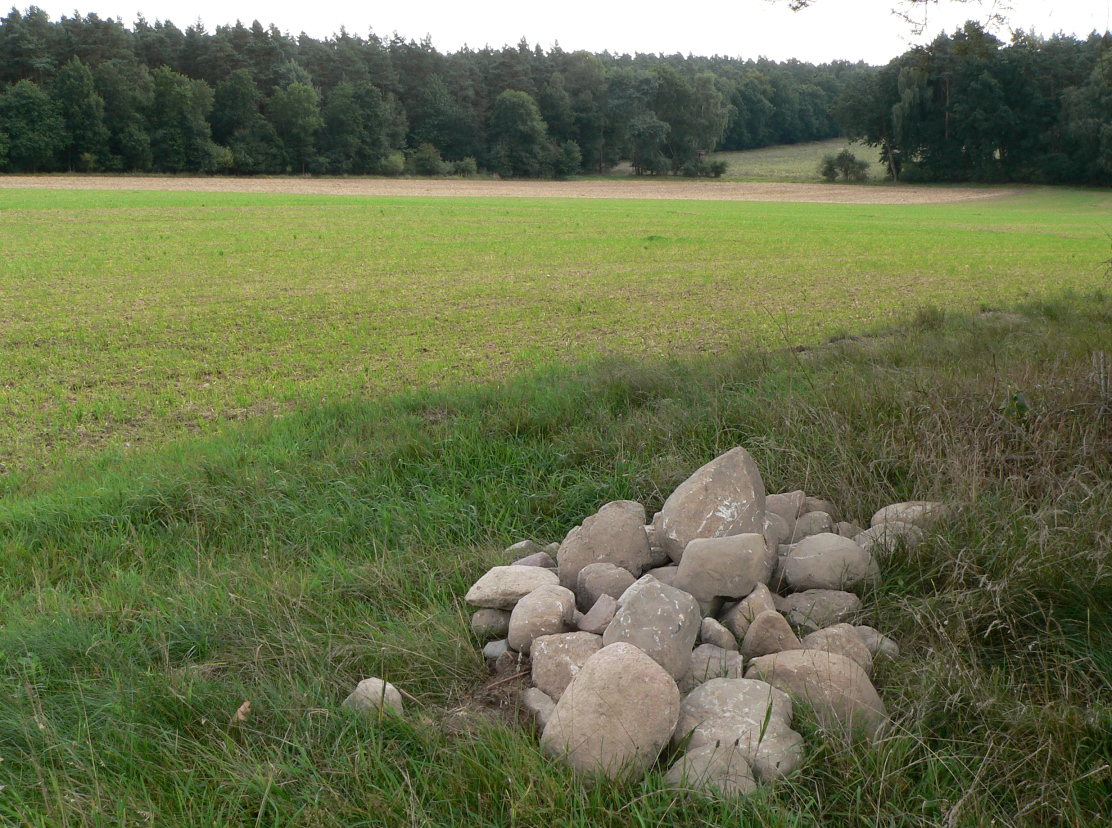 Lesesteinhaufen im Grinderwald mit kopfgroßem Geröll, Grind genannt